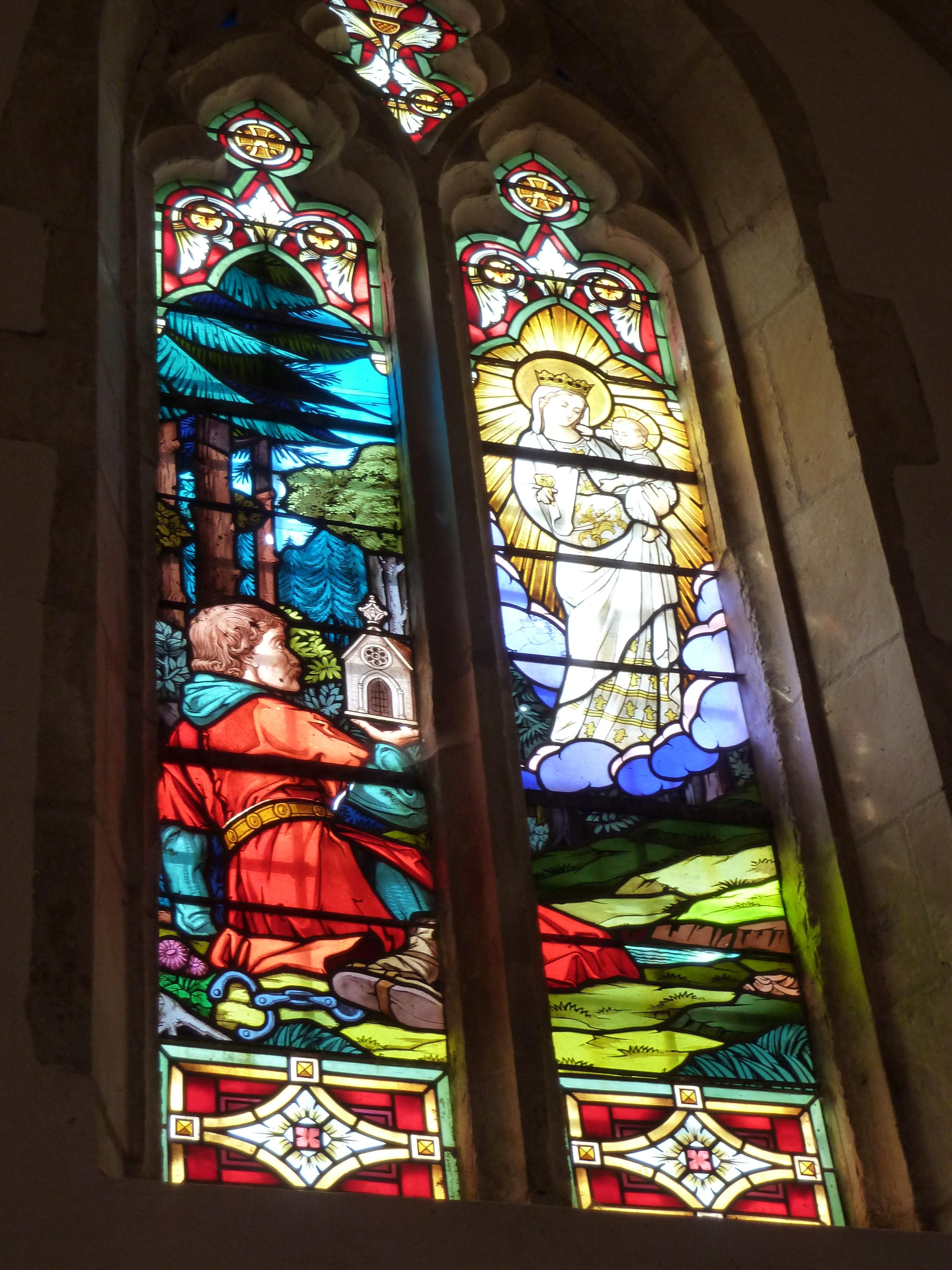 Pagny-sur-Meuse Chapelle de Massey vitrail de la chapelle sur lequel la chapelle elle-même est représentée.